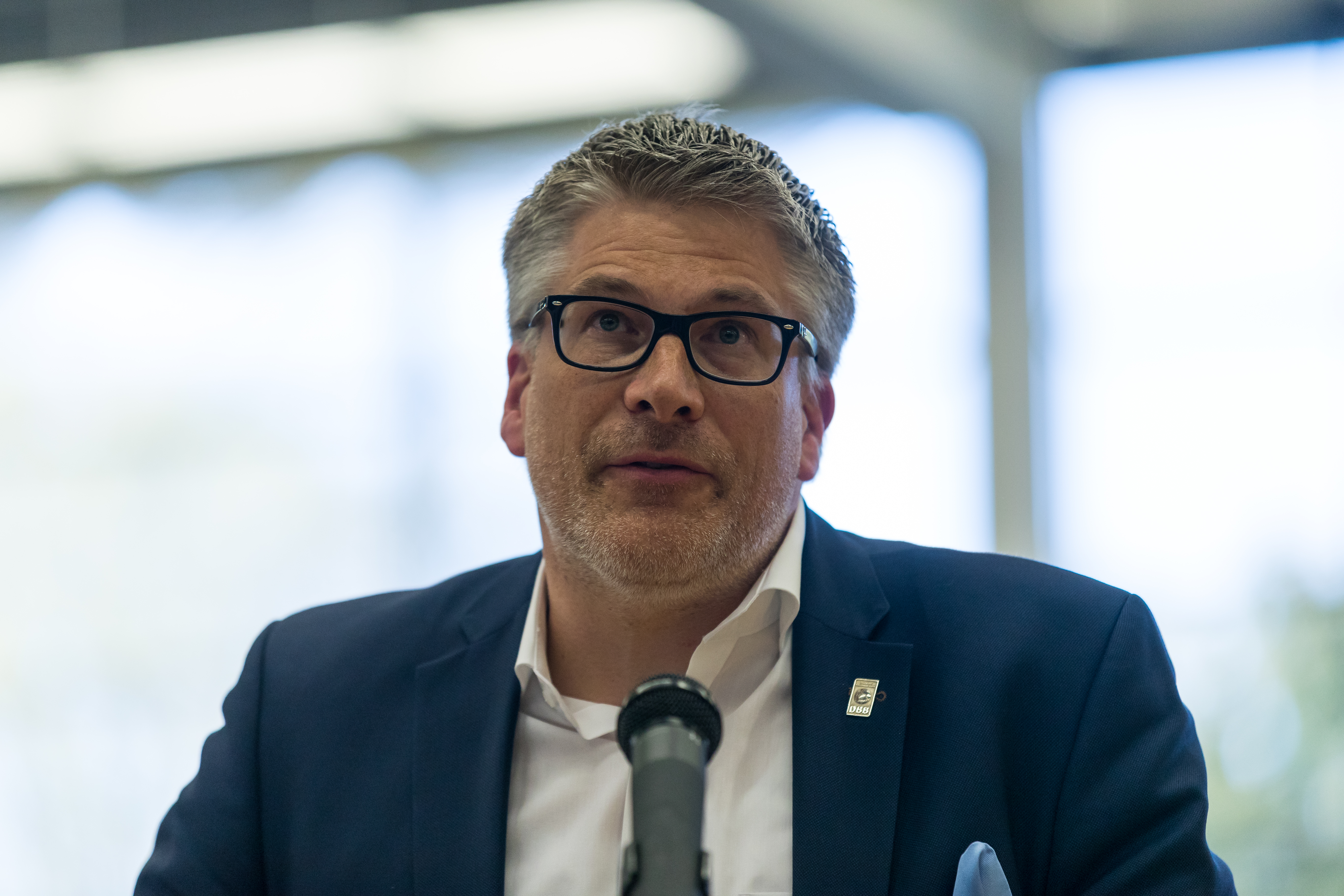 during Closing ceremony Basketball Albert Schweitzer Turnier at GBG Halle, Mannheim, Baden-Württemberg, Germany on 2018-04-07, Photo: Sven Mandel